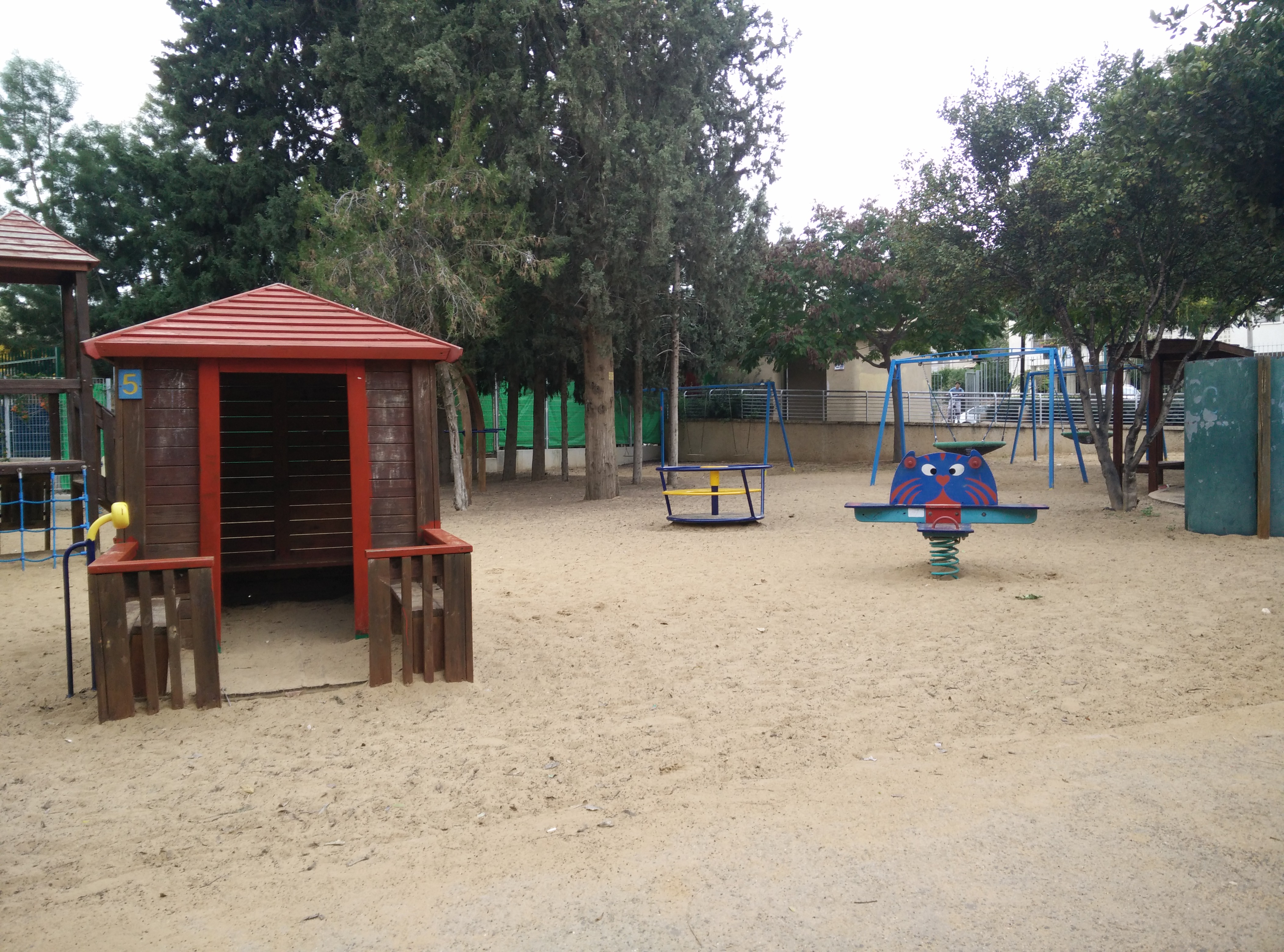 אזור המשחקים שבגן